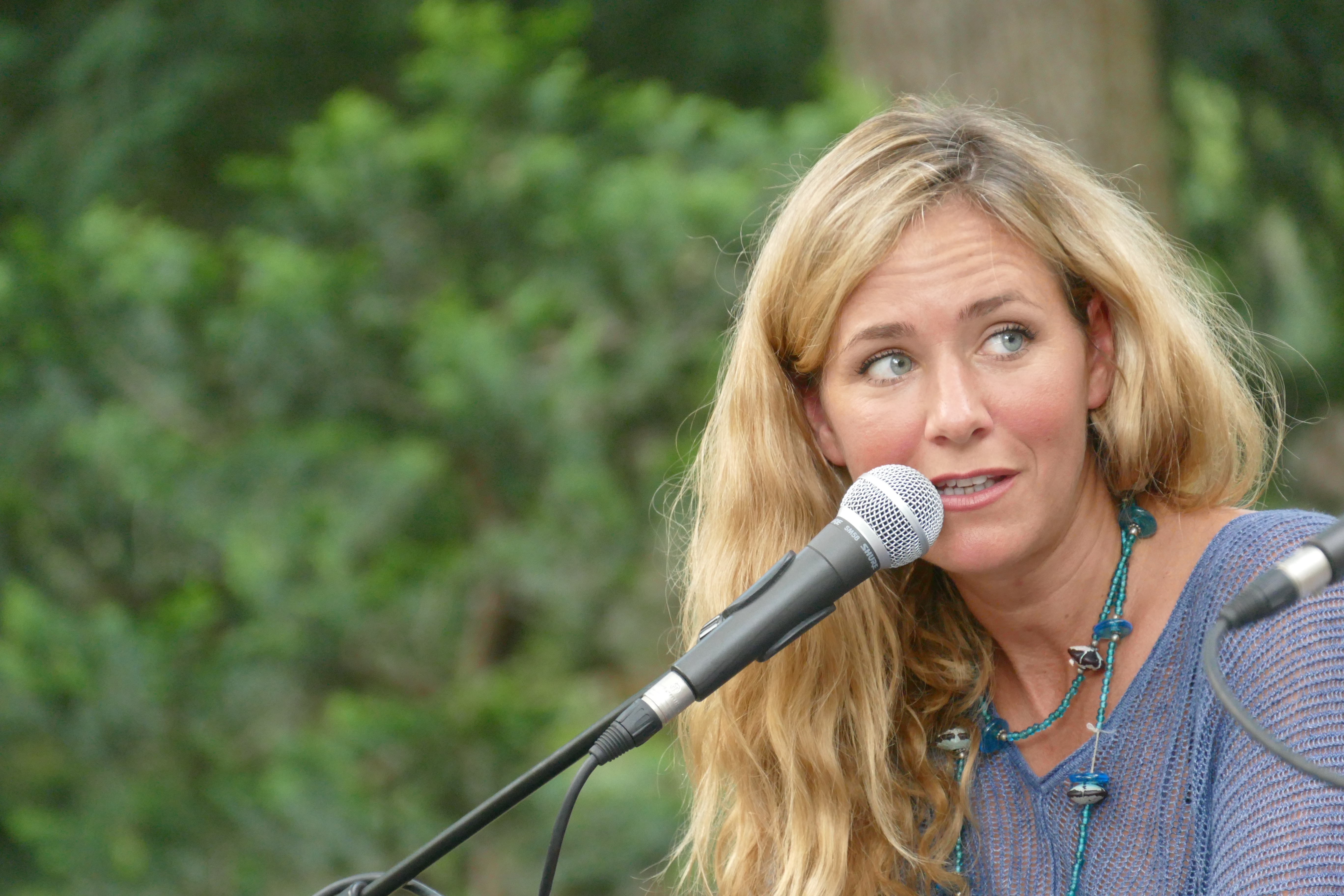 Katharina Winkler stellt im Gespräch mit Dirk Kruse auf dem Erlanger Poetenfest 2016 ihren Roman "Blauschmuck" vor.